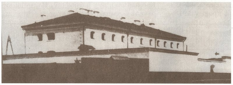 Вілейская турма да 1930-ых гадоў